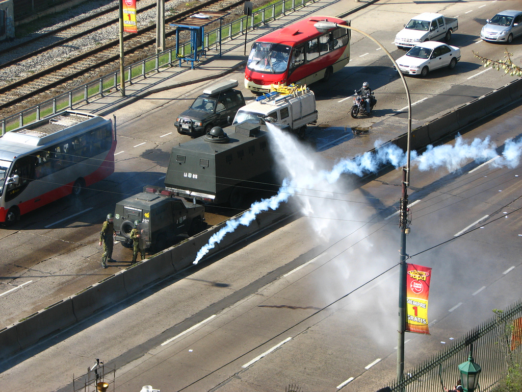 gracias por la bomba, pero no la queremos...